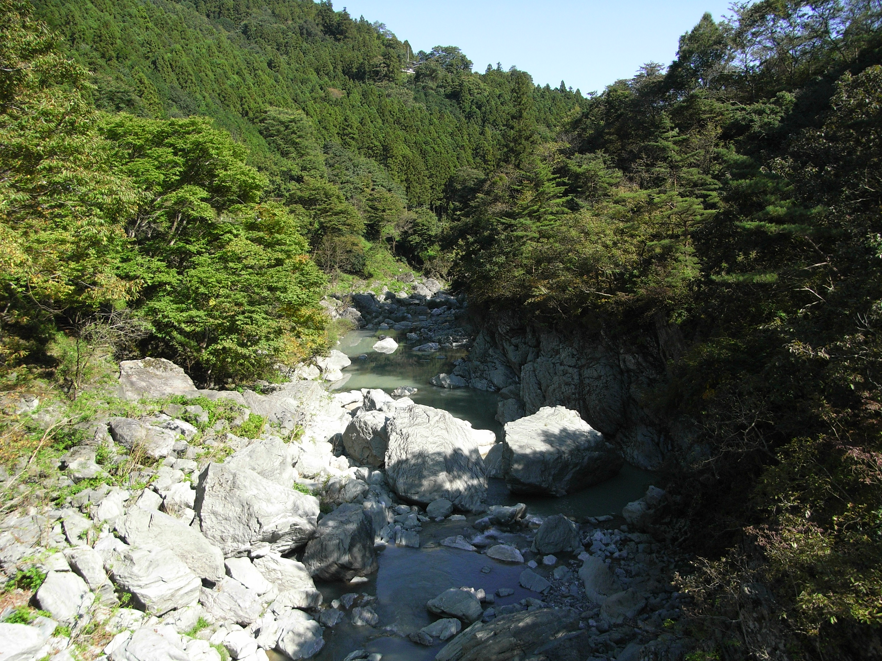 Canyon